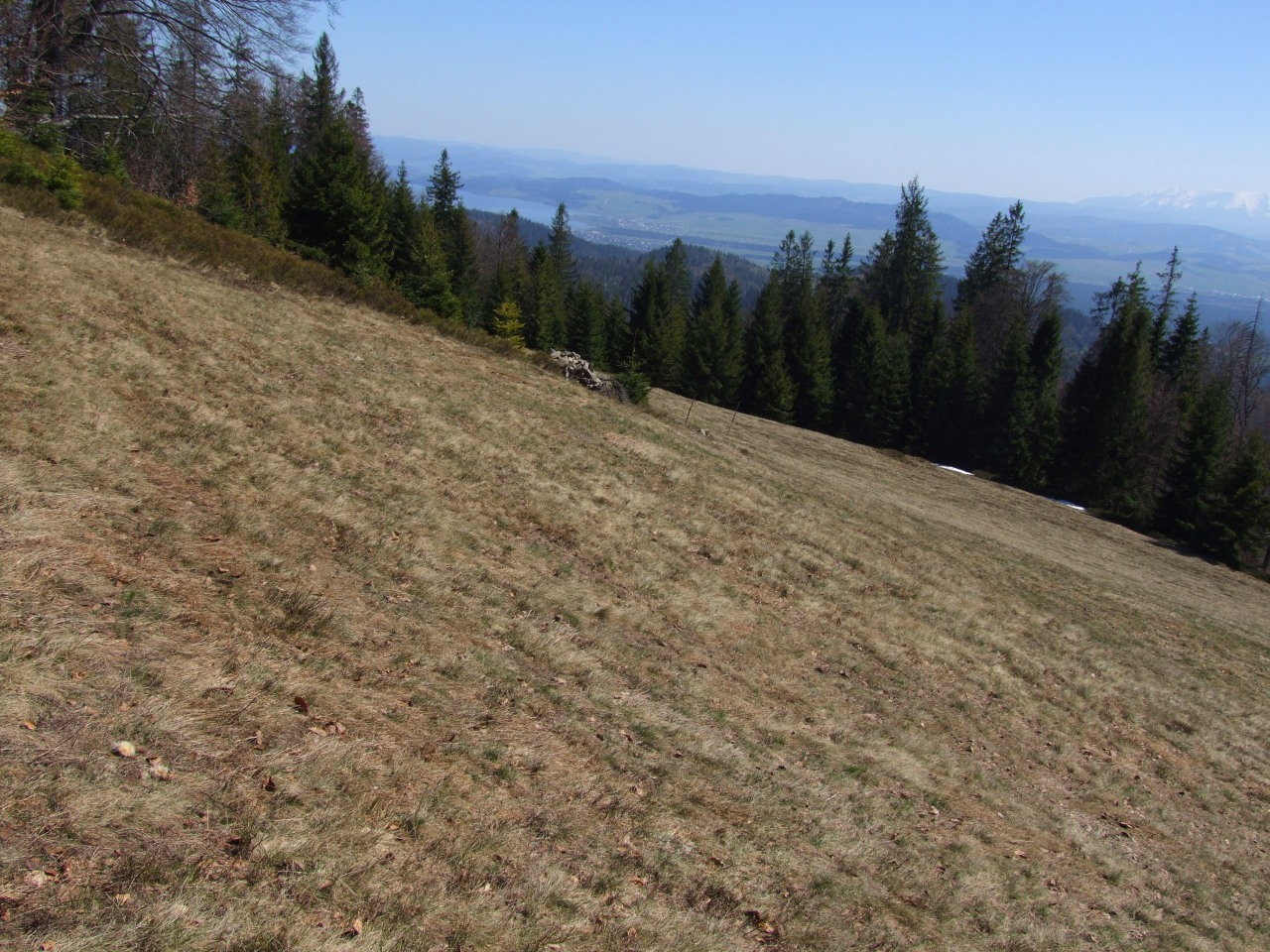 Polana Wysznia w Gorcach